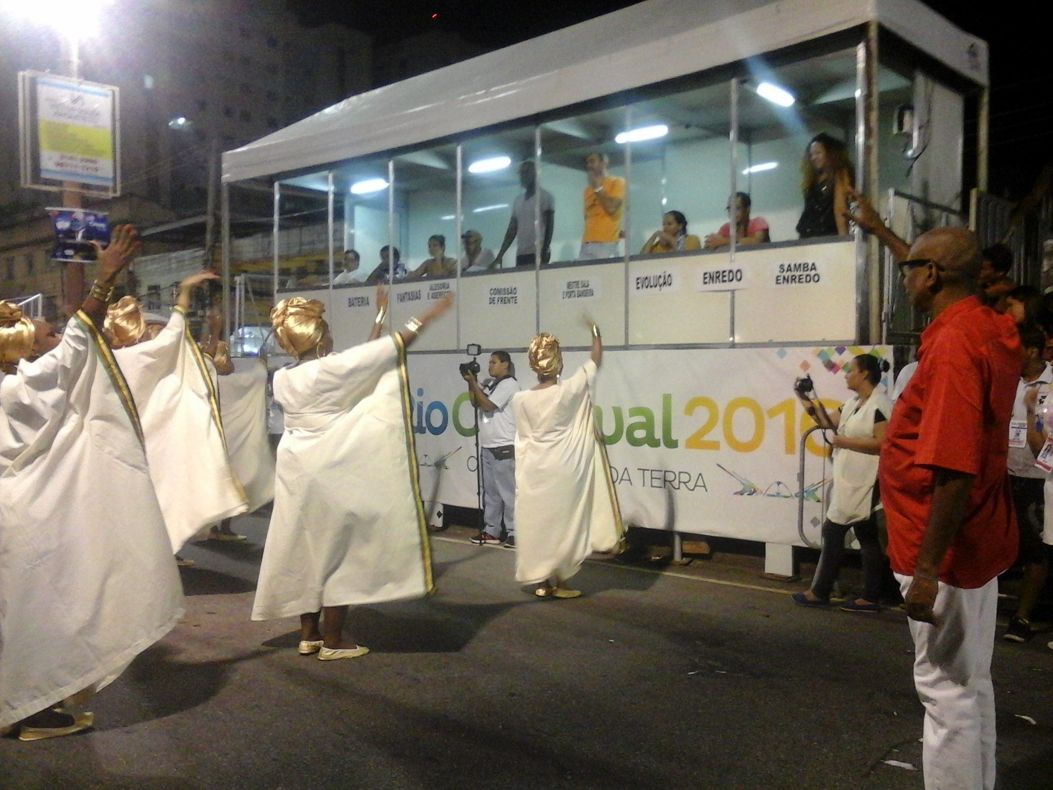 GPCRES Bohêmios da Cinelândia